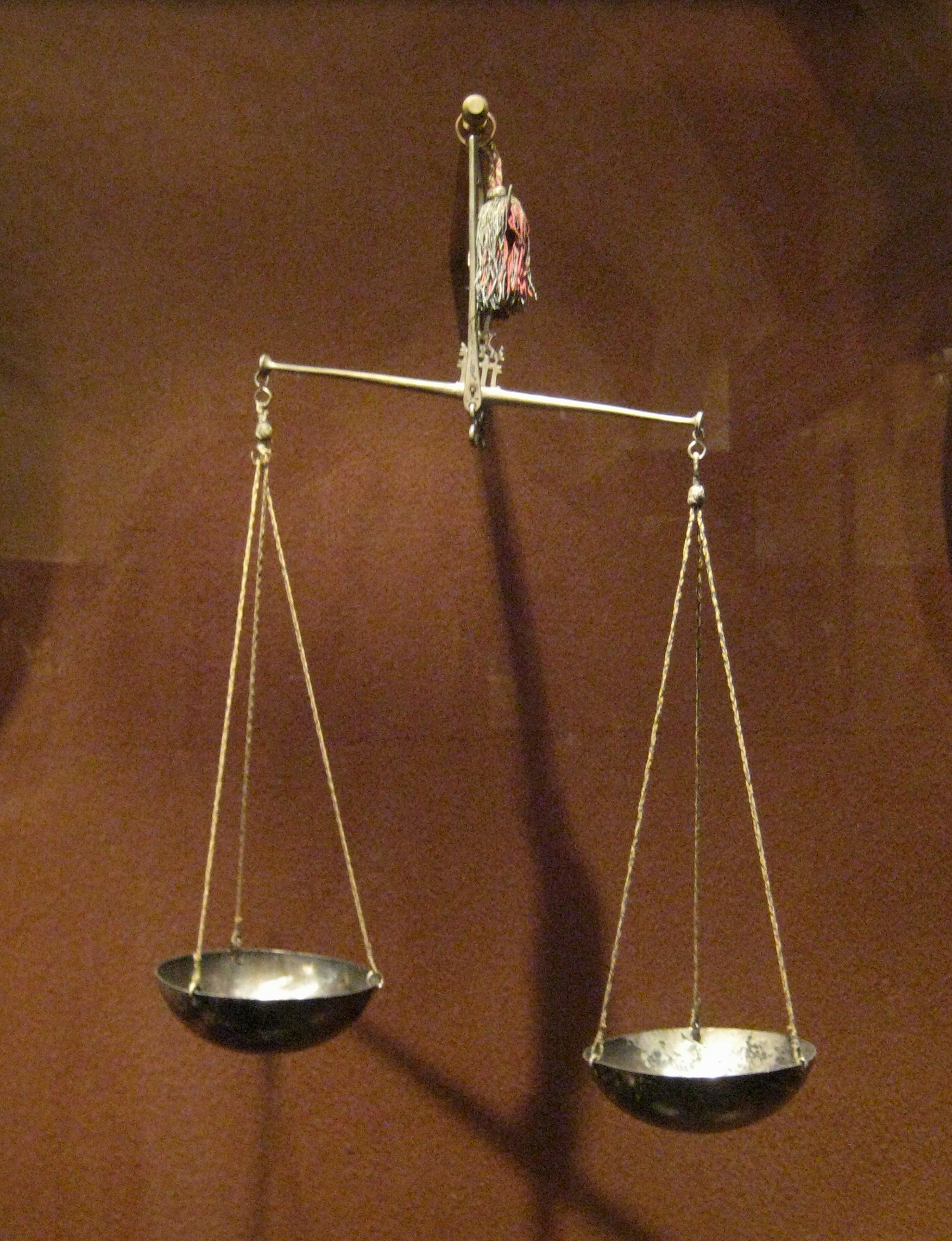 Весы